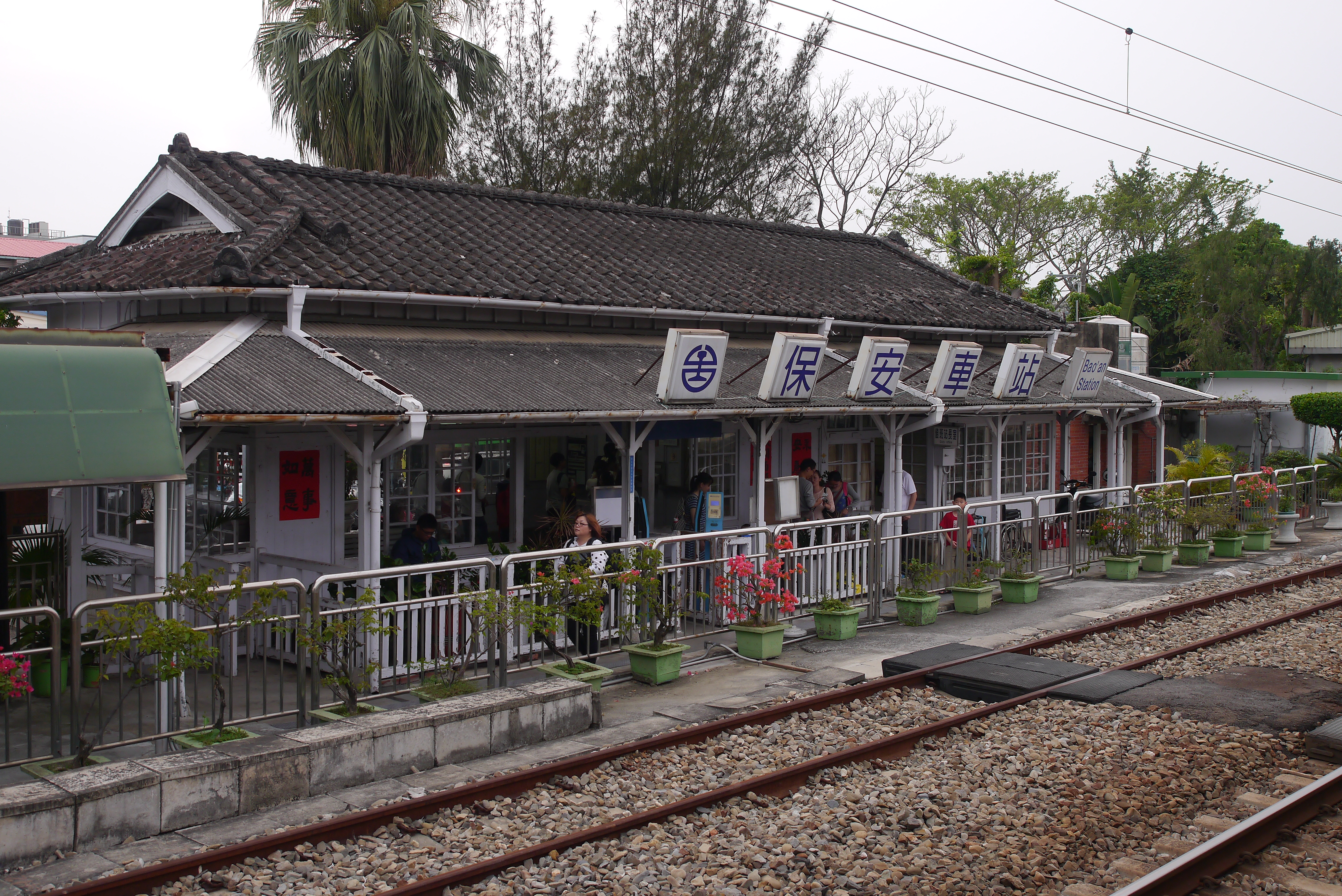 臺灣鐵路管理局保安車站。